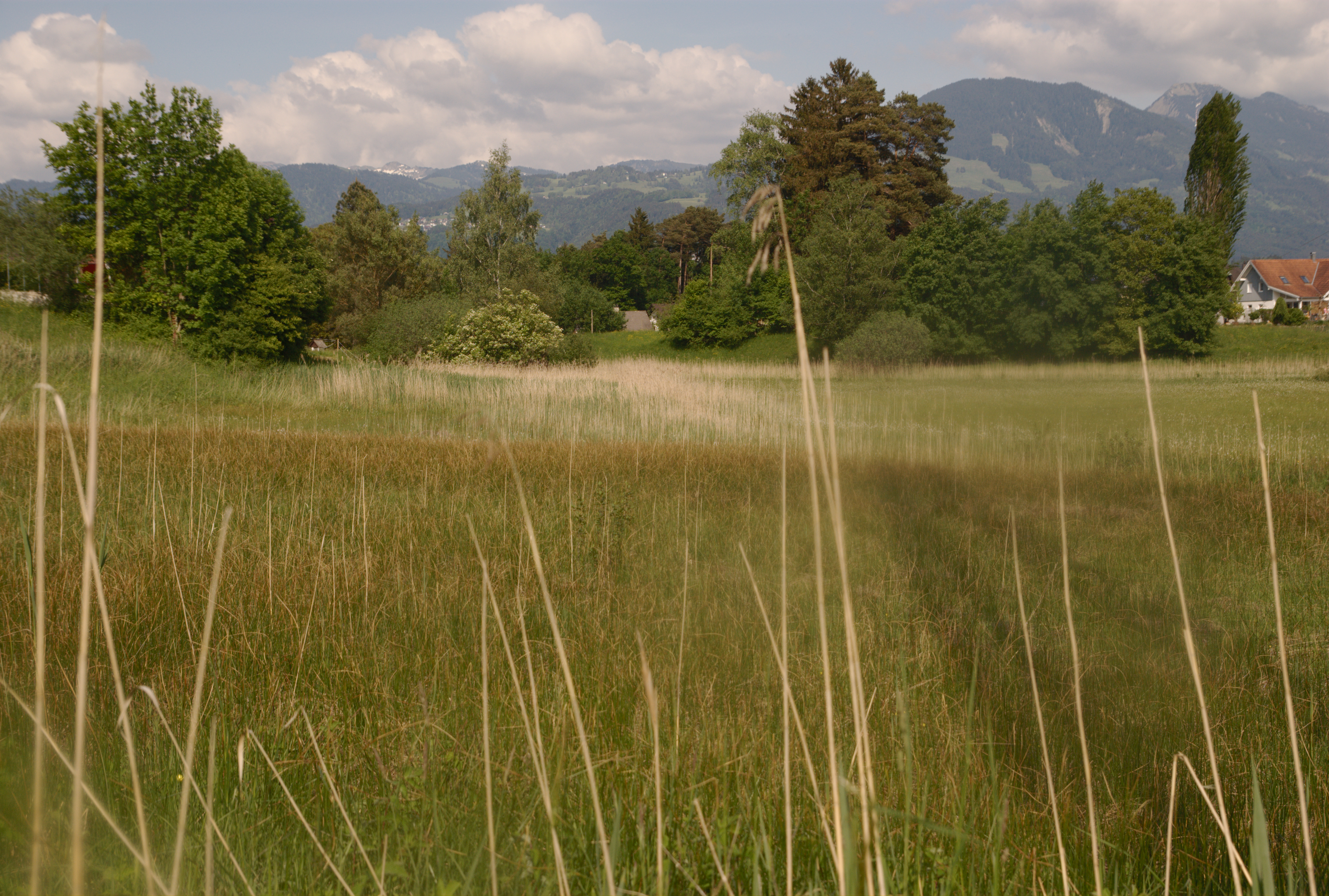 Maria-Grüner Ried This media shows the nature reserve in Vorarlberg with the ID 8017.